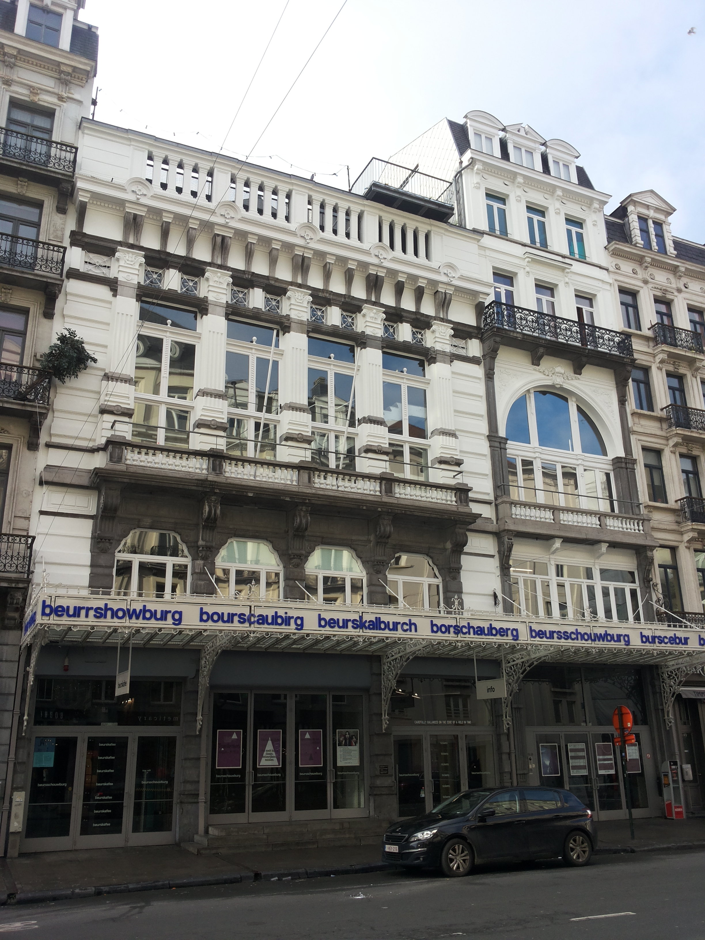 Beursschouwburg, Brussel, België